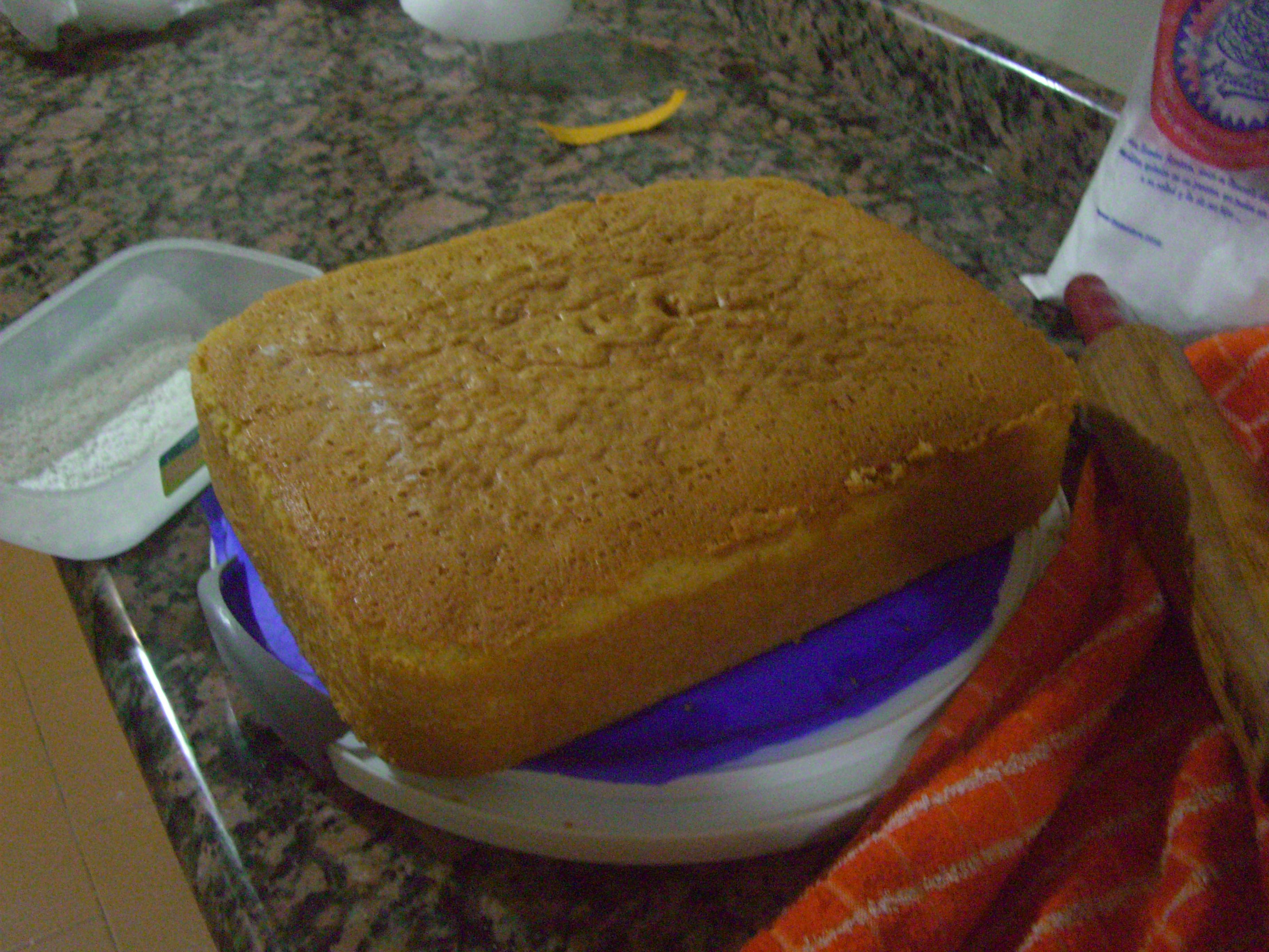 Una torta (pastel) de vainilla simple